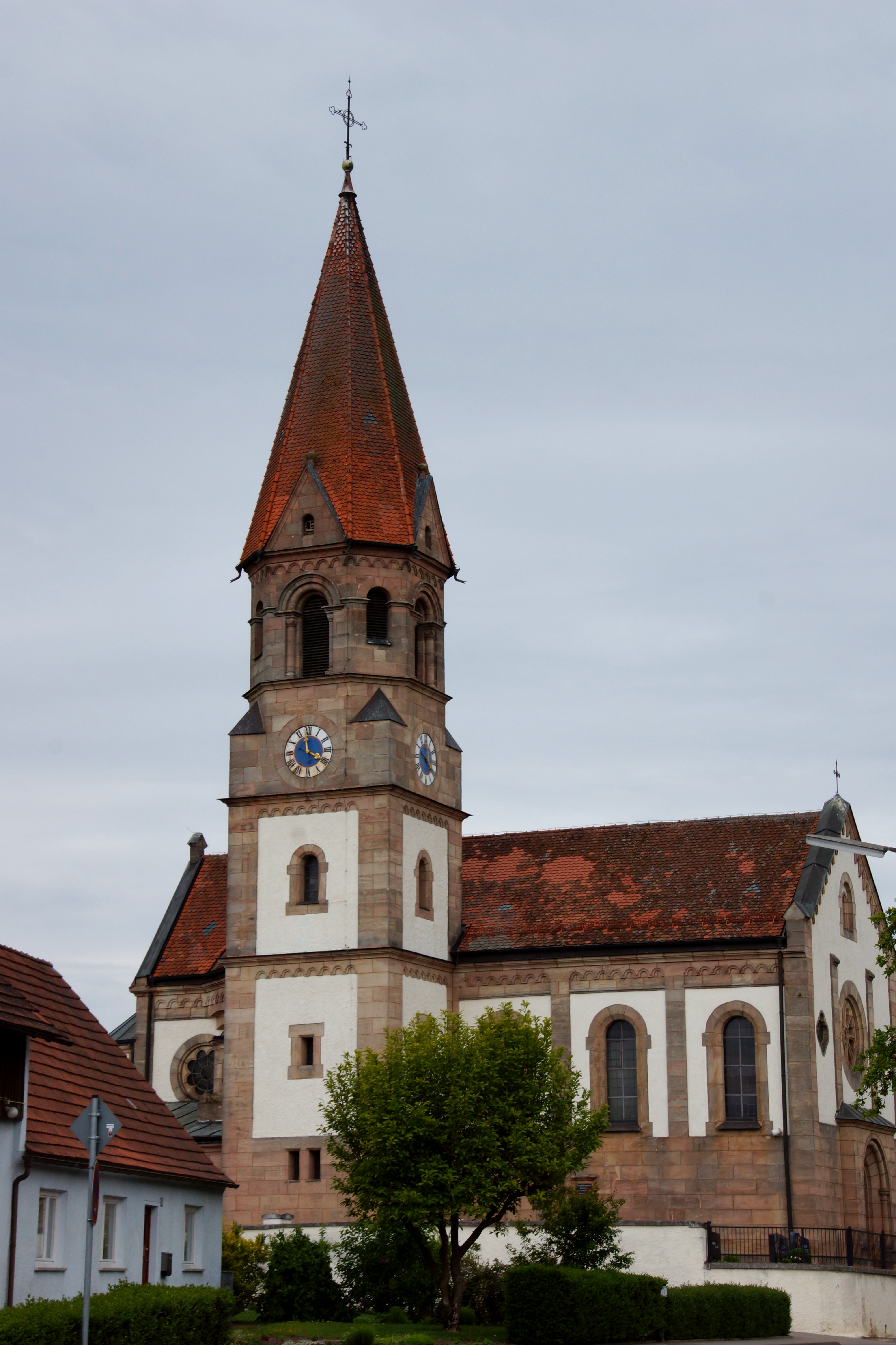 Die katholische Pfarrkirche Mariä Himmelfahrt in Ebenried bei Allersberg